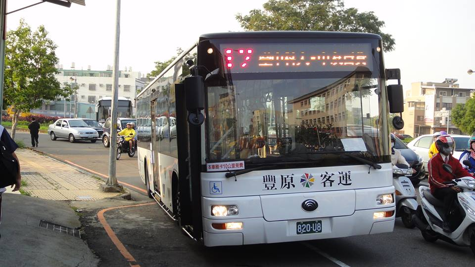 豐原客運2015年宇通大客車820-U8行駛台中市公車12路